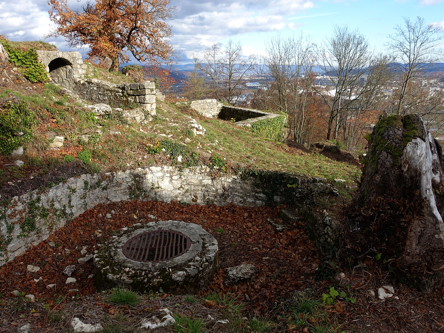 Vordere Ruine Wartenberg, Muttenz, Innenbereich mit Brunnen, Blick nach Pratteln